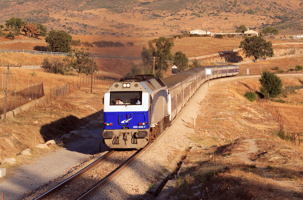 El Trenhotel Francisco de Goya con la locomotora diésel 333.406 (Serie 333) (PRIMA) de Renfe Operadora, en Soto, en el Ferrocarril de Madrid a Burgos por Aranda de Duero.